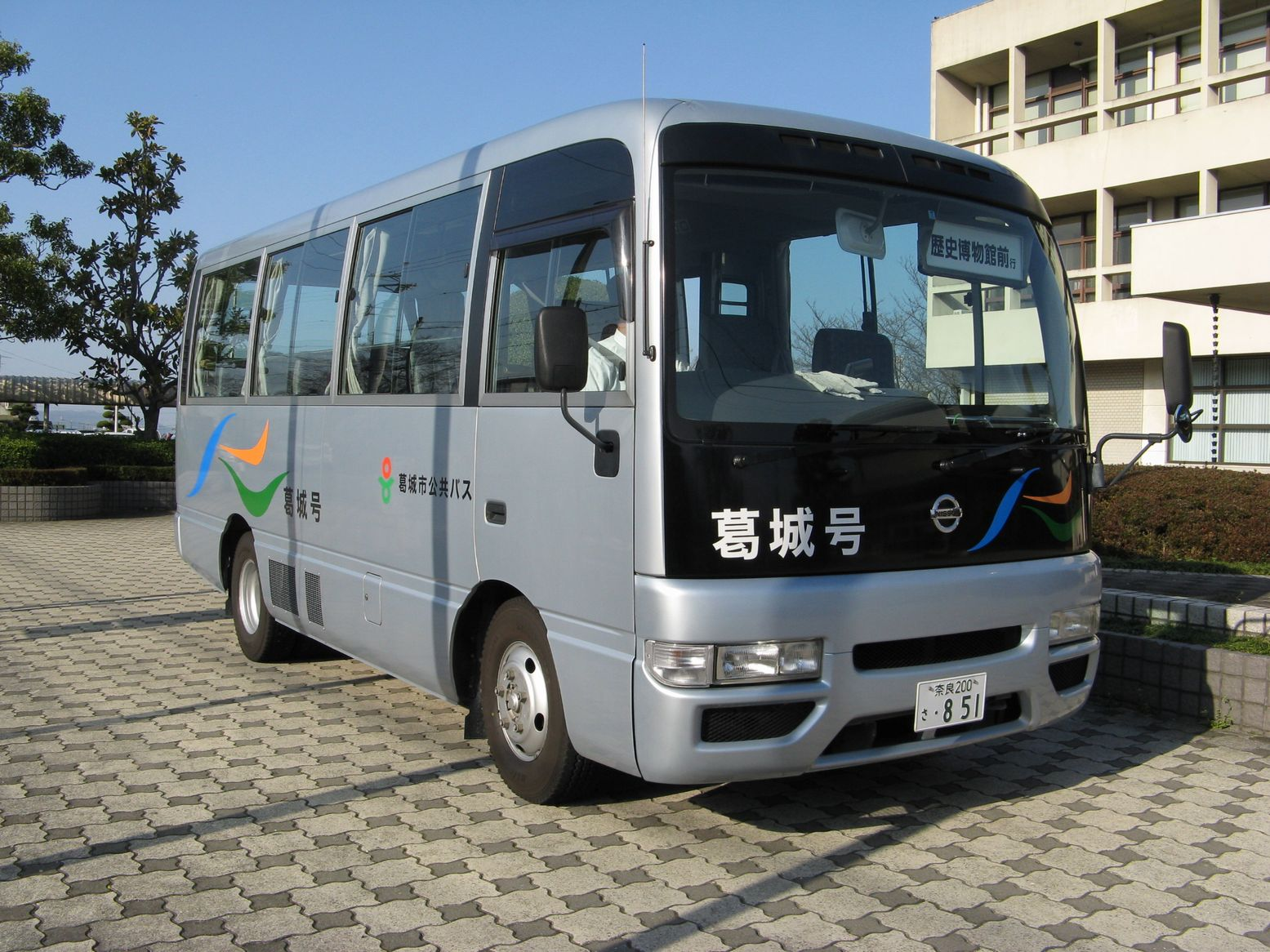 葛城号 葛城市役所當麻庁舎にて